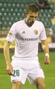 Юрій Коломоєць - український футболіст у складі Ворскли